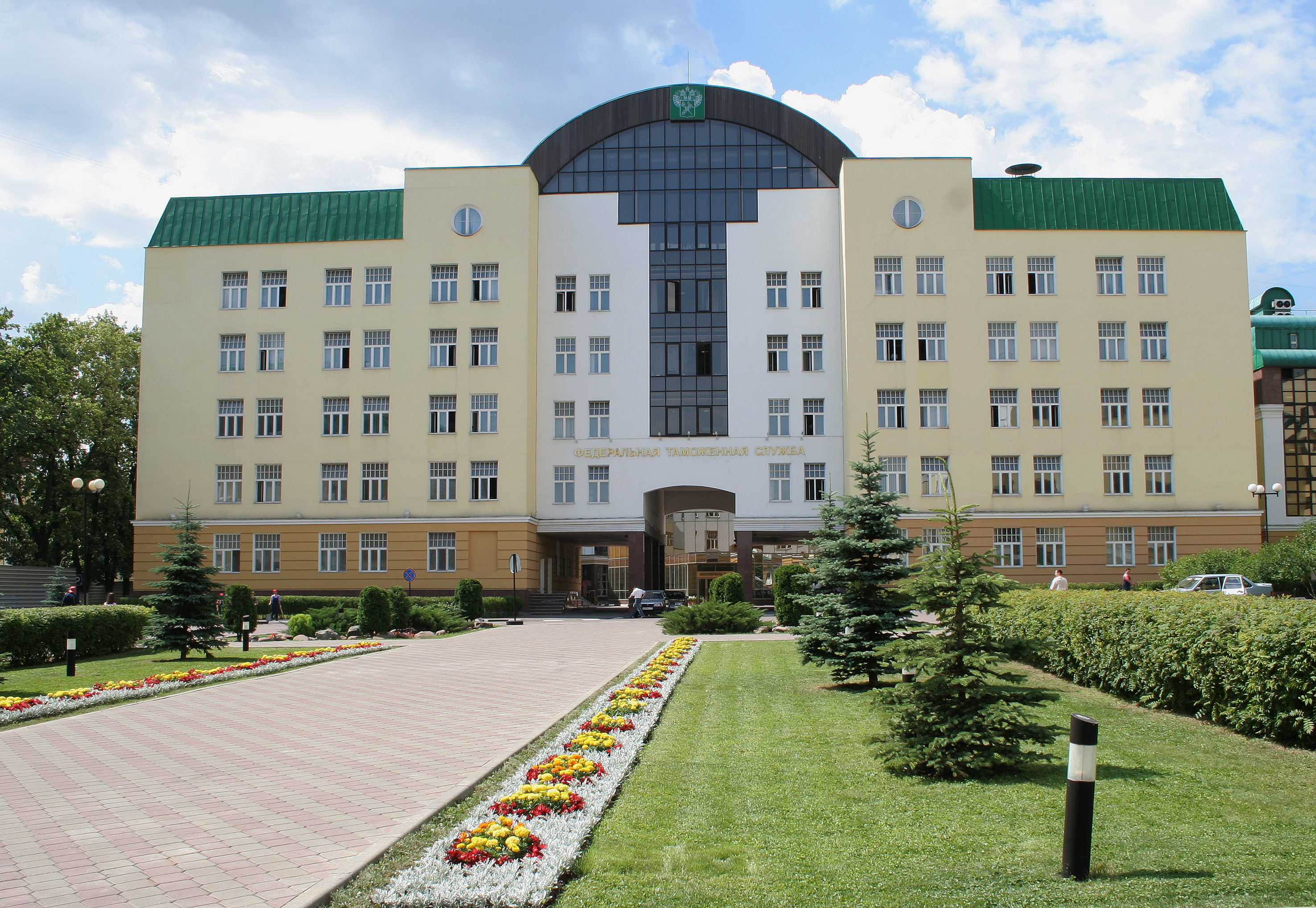 Комплекс зданий ФТС России